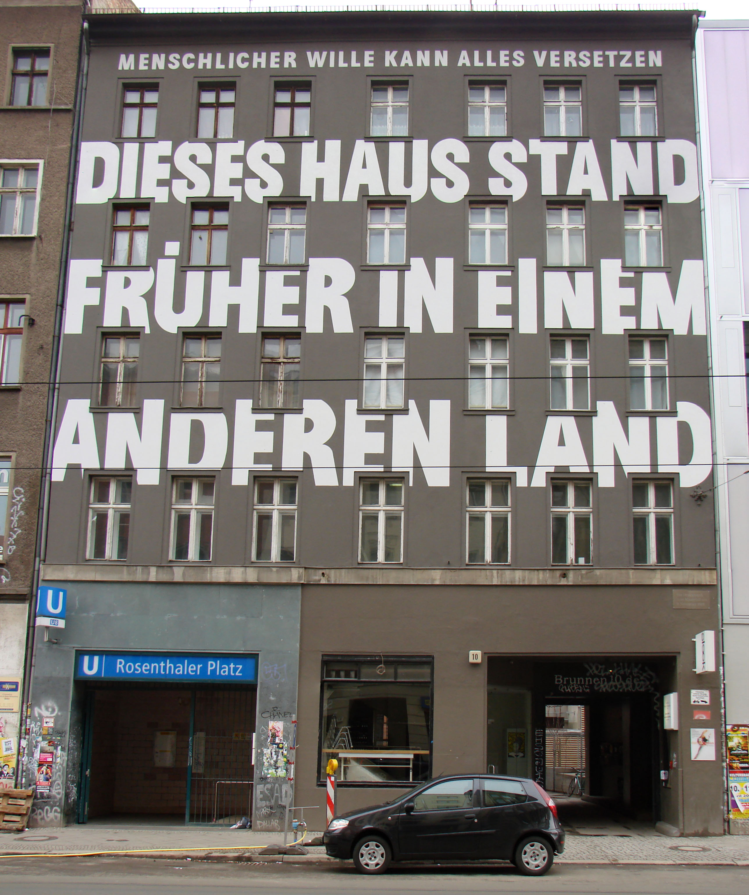 Fassade in der Brunnenstraße, Berlin-Mitte. Gestaltet 2009 von Jean-Remy von Matt. Ausgang U-Bahnhof Rosenthaler Platz